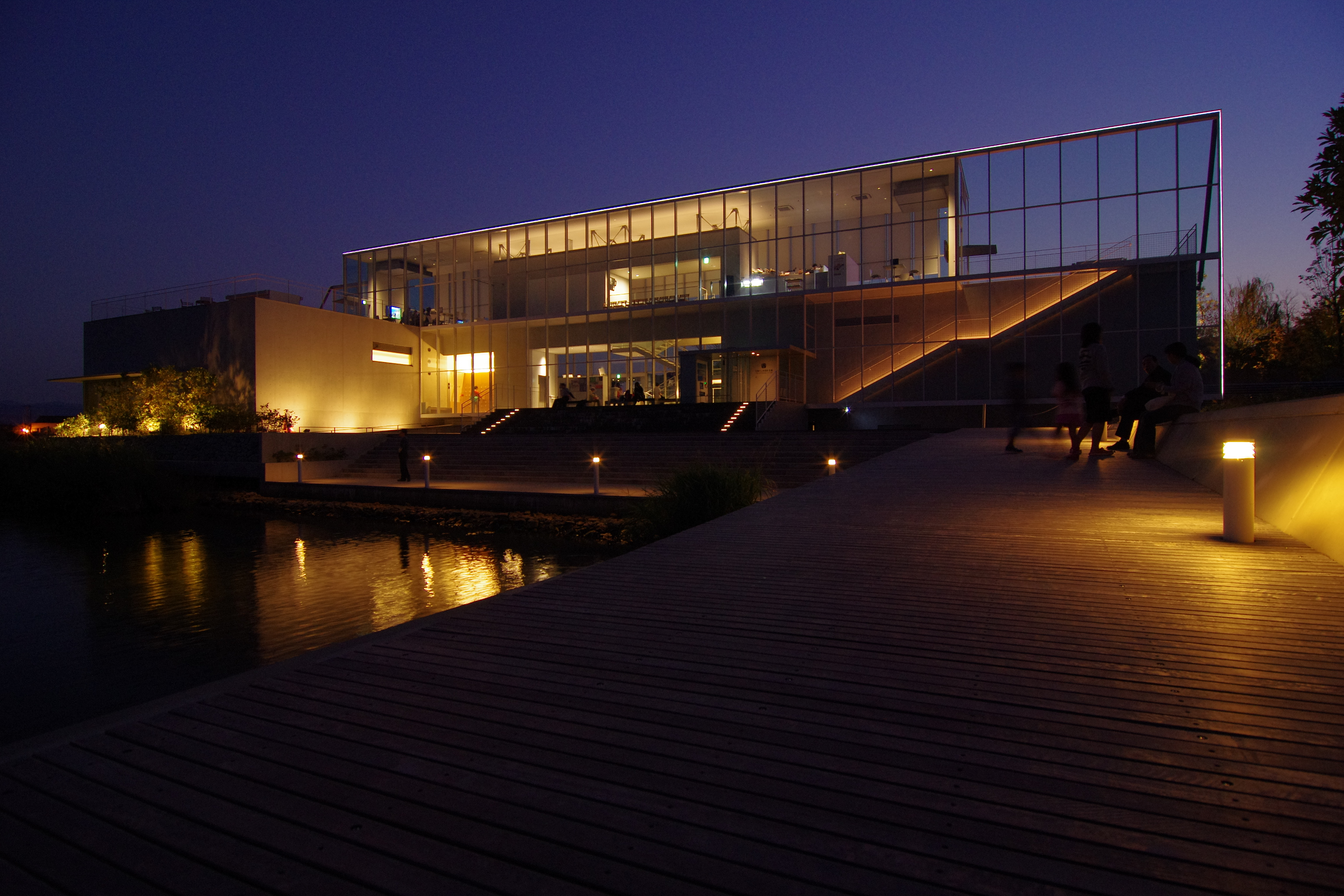 石川県加賀市、片山津温泉街湯。谷口吉生設計。